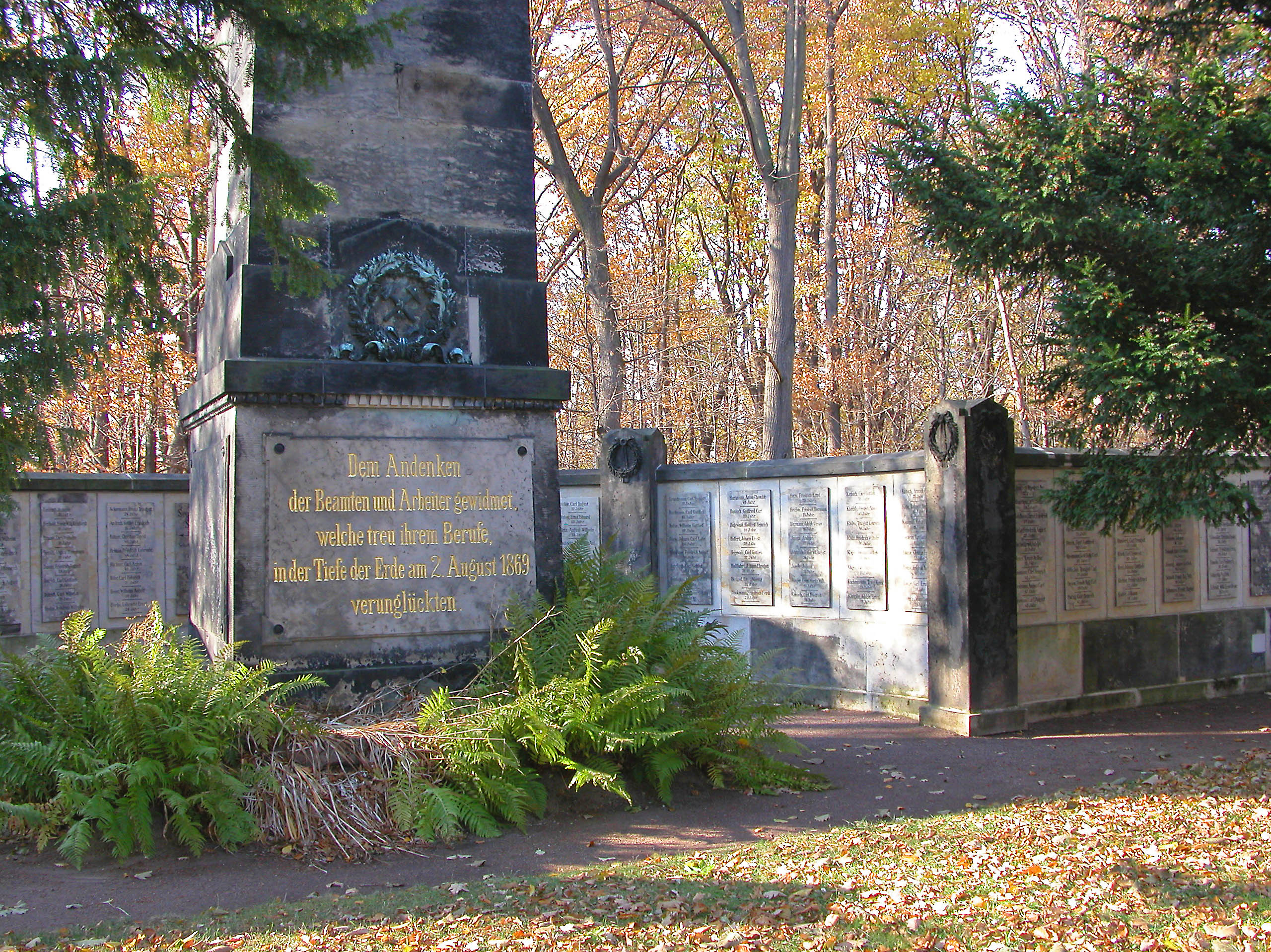 19.01.2017 01705 Kleinnaundorf (zu Freital): Am Segen, Bergmannsgrab. Obelisk auf dem Gelände des ehemaligen Segen-Gottes-Schachtes zum Gedenken an das Grubenunglück vom 2. August 1869. [SAM8193.JPG]20170119100DR.JPG(c)Blobelt